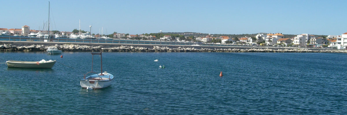 Rogoznica - most koji spaja otok s kopnom